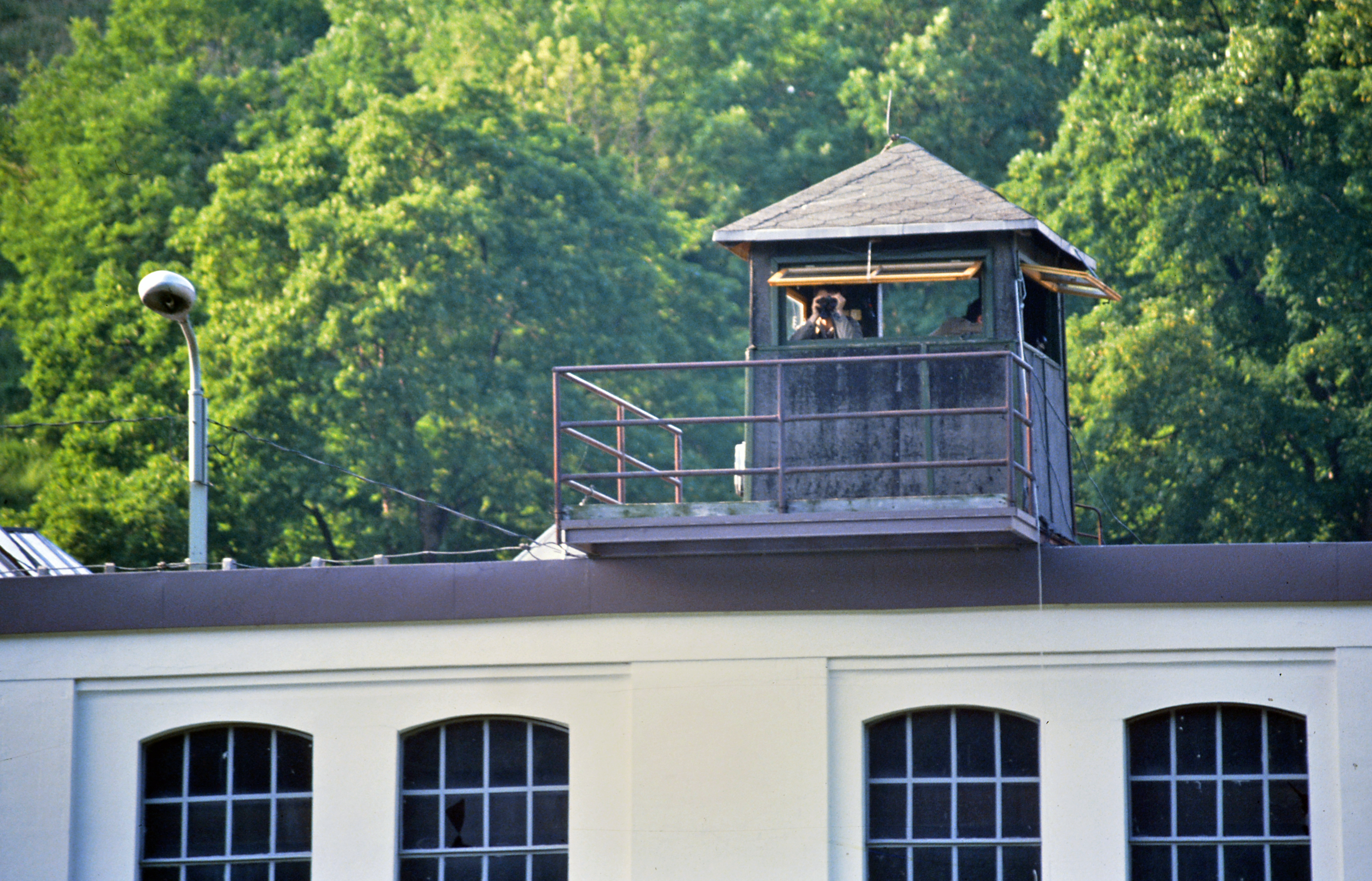 Beobachtungsturm der Grenzschutztruppe der DDR in Blankenstein (Saale) auf einem Fabrikgelände an der Selbitz (Juni 1989)